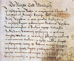 Будишинская присяга (Burger Eydt Wendisch) из архива Сербского института в Баутцене.